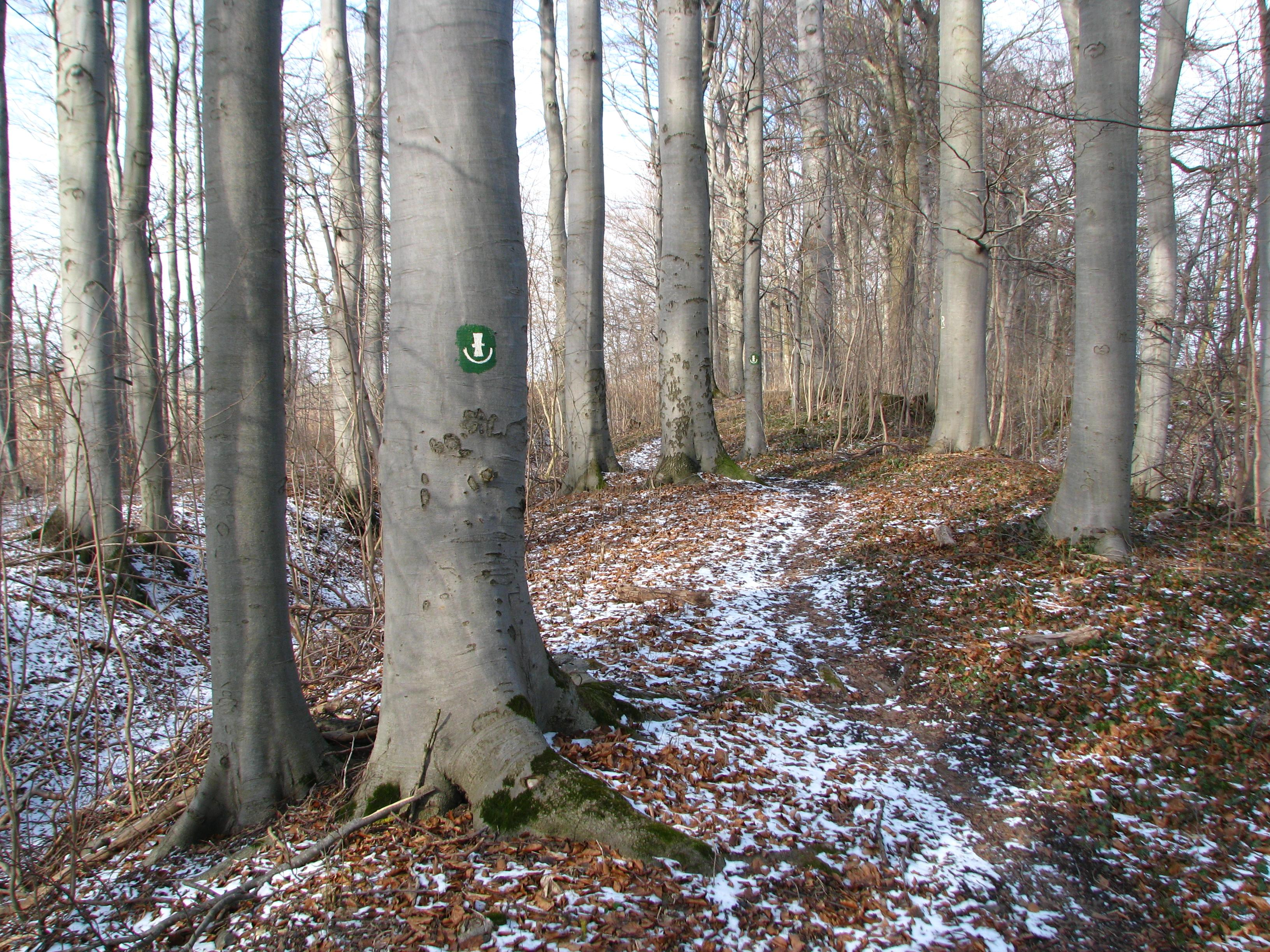 Der Mühlhäuser Landgraben südwestlich von Eigenrieden.